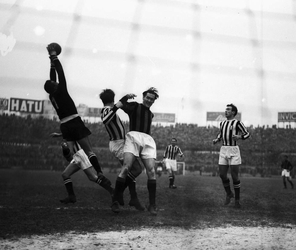 Torino, stadio Comunale, 7 dicembre 1952. Il portiere juventino Giovanni Viola (in alto) para una conclusione del centrocampista milanista Nils Liedholm (al centro) nel corso della classica tra Juventus e Milan (0-3) valevole per la 12ª giornata del campionato italiano di Serie A 1952-53.